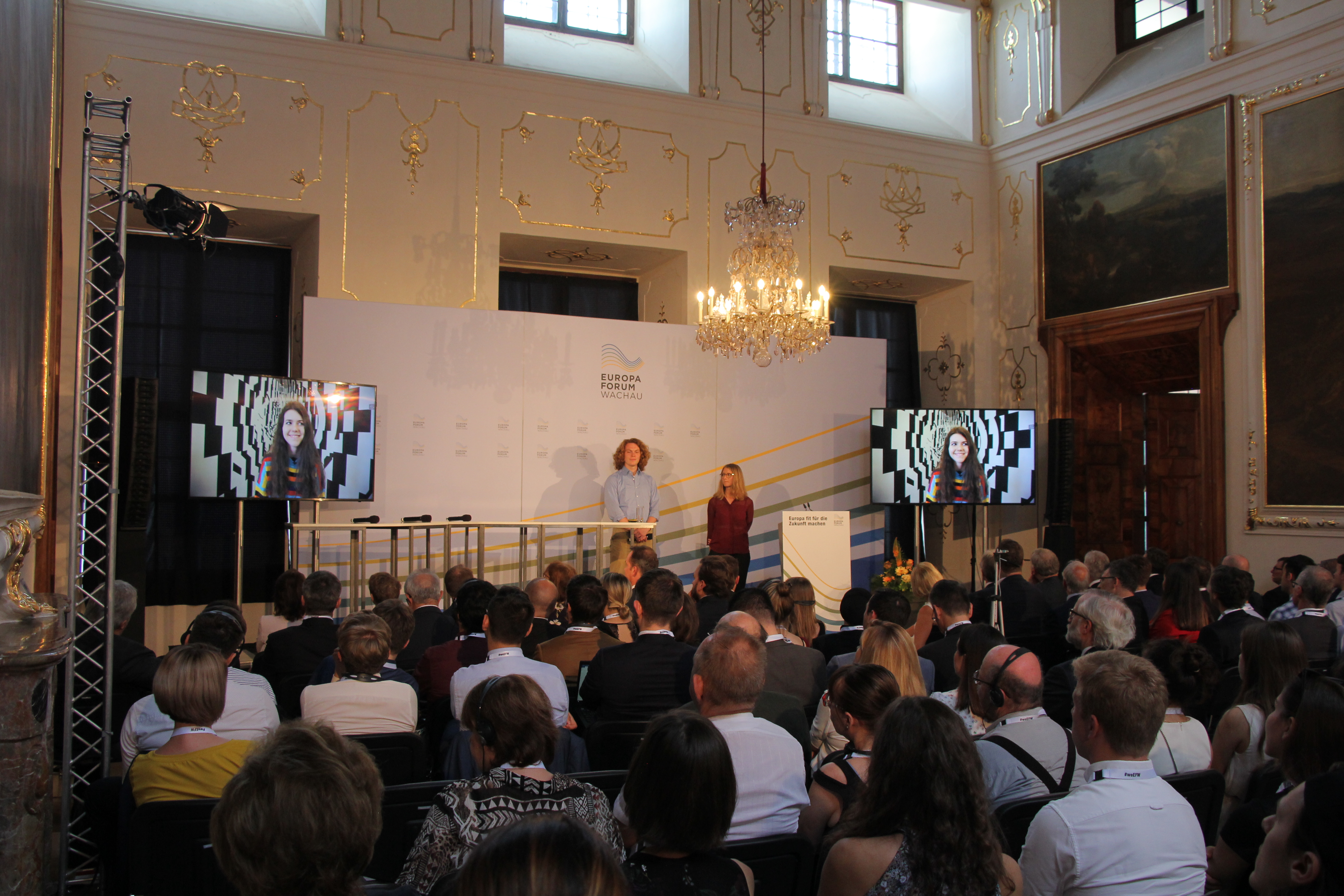 Europaforum Wachau 2019 auf Stift Göttweig